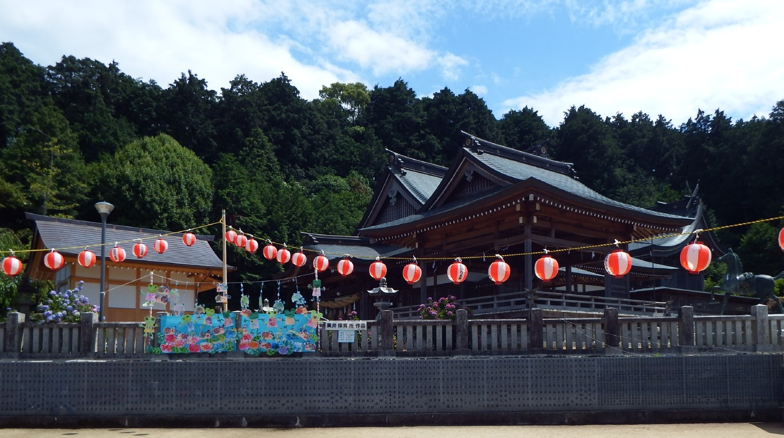 粟井神社境内